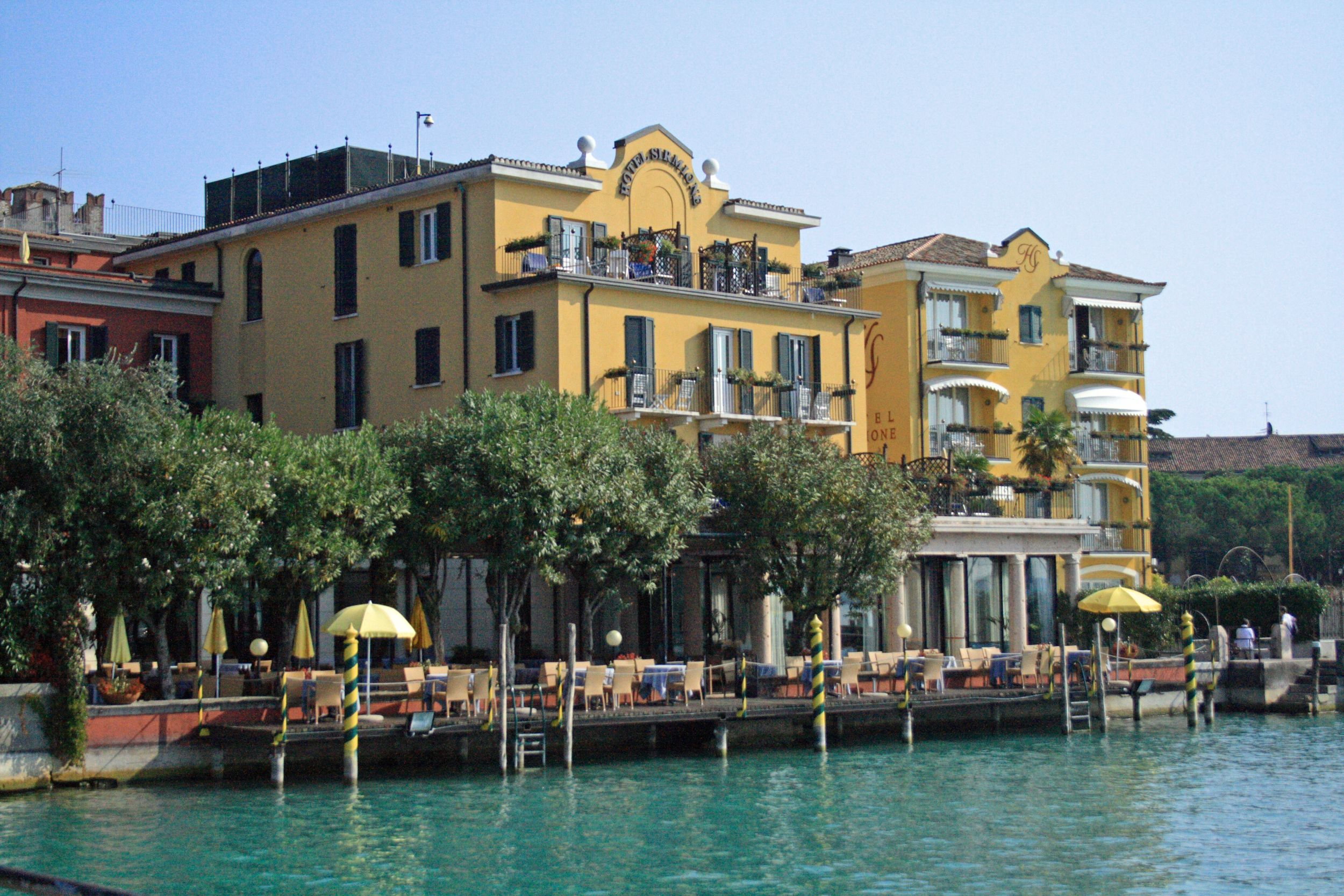 Häuser am Hafen von Sirmione